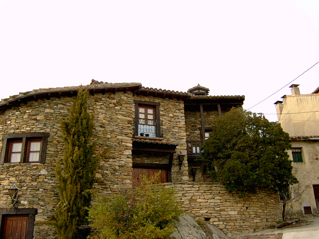 Arquitectura rural típica de la sierra norte de la Comunidad de Madrid. Fotografía tomada en Horcajuelo de la Sierra.